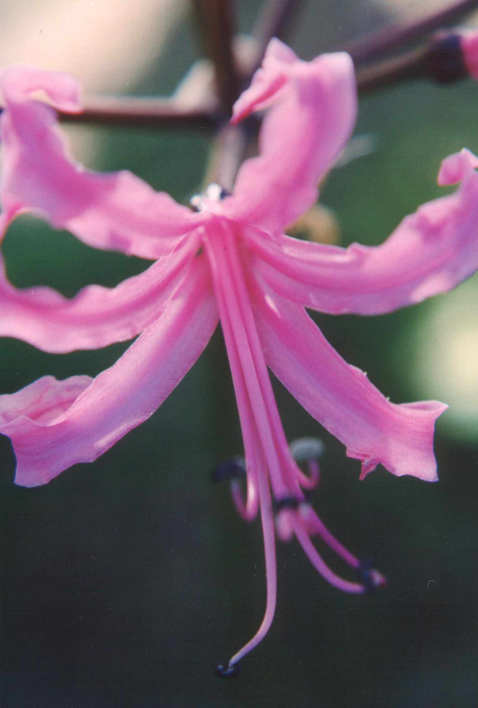 Nerine bowdenii